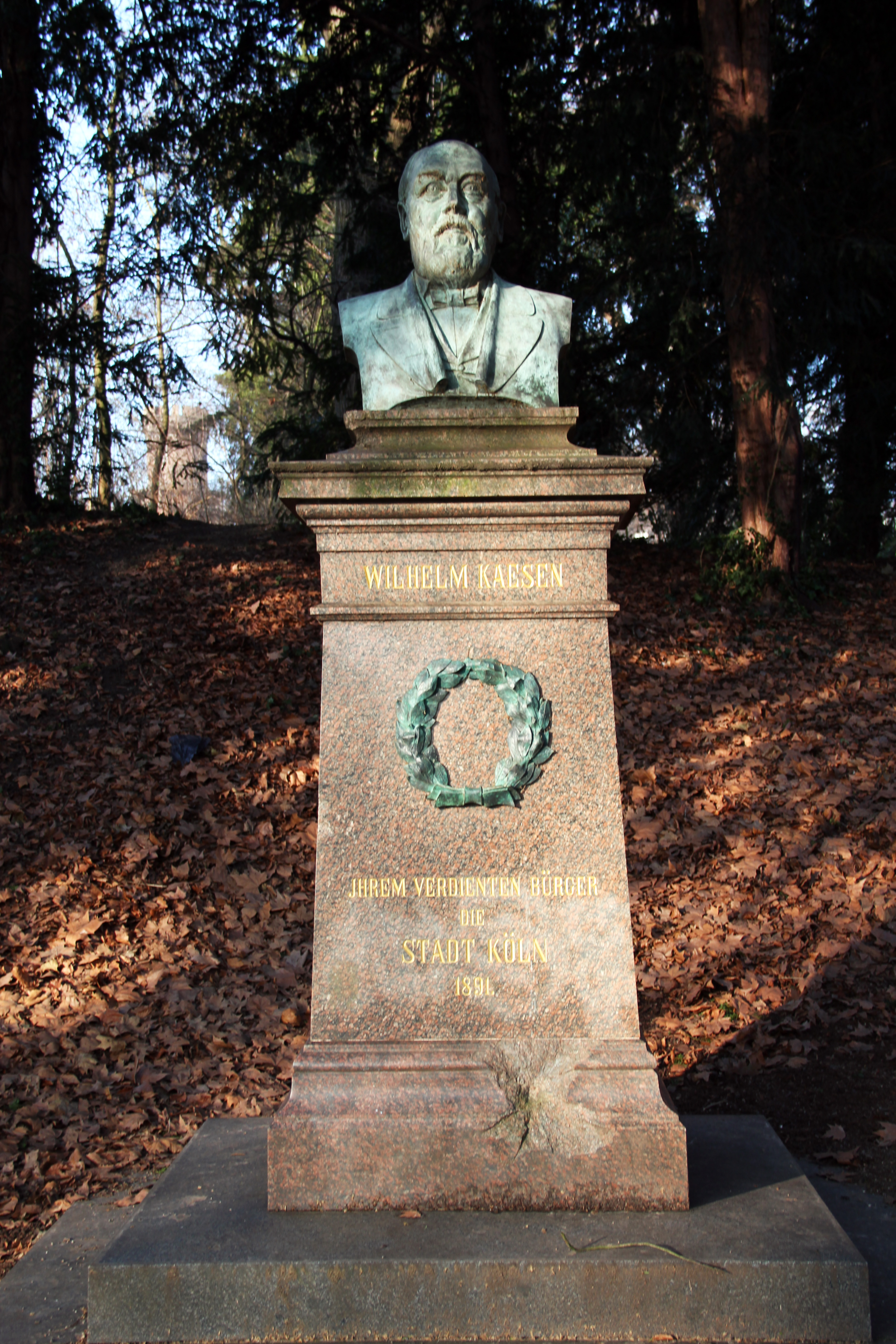 Gedenkstein der Stadt Köln für den Commercienrath Wilhelm Kaesen aus dem Jahr 1891 im Volksgarten. Die verschollene Büste von Anton Werres wurde nach alten Fotos von Akos Sziráki erneuert Künstler: Anton Werres (1830–1900) DescriptionGerman artistdeutscher BildhauerDate of birth/death 1 January 1830 27 April 1900 Location of birth/death Cologne CologneWork location Cologne, RomAuthority control : Q15729050 VIAF: 81616740 ISNI: 0000 0000 6689 7990 ULAN: 500088900 GND: 137423101 creator QS:P170,Q15729050